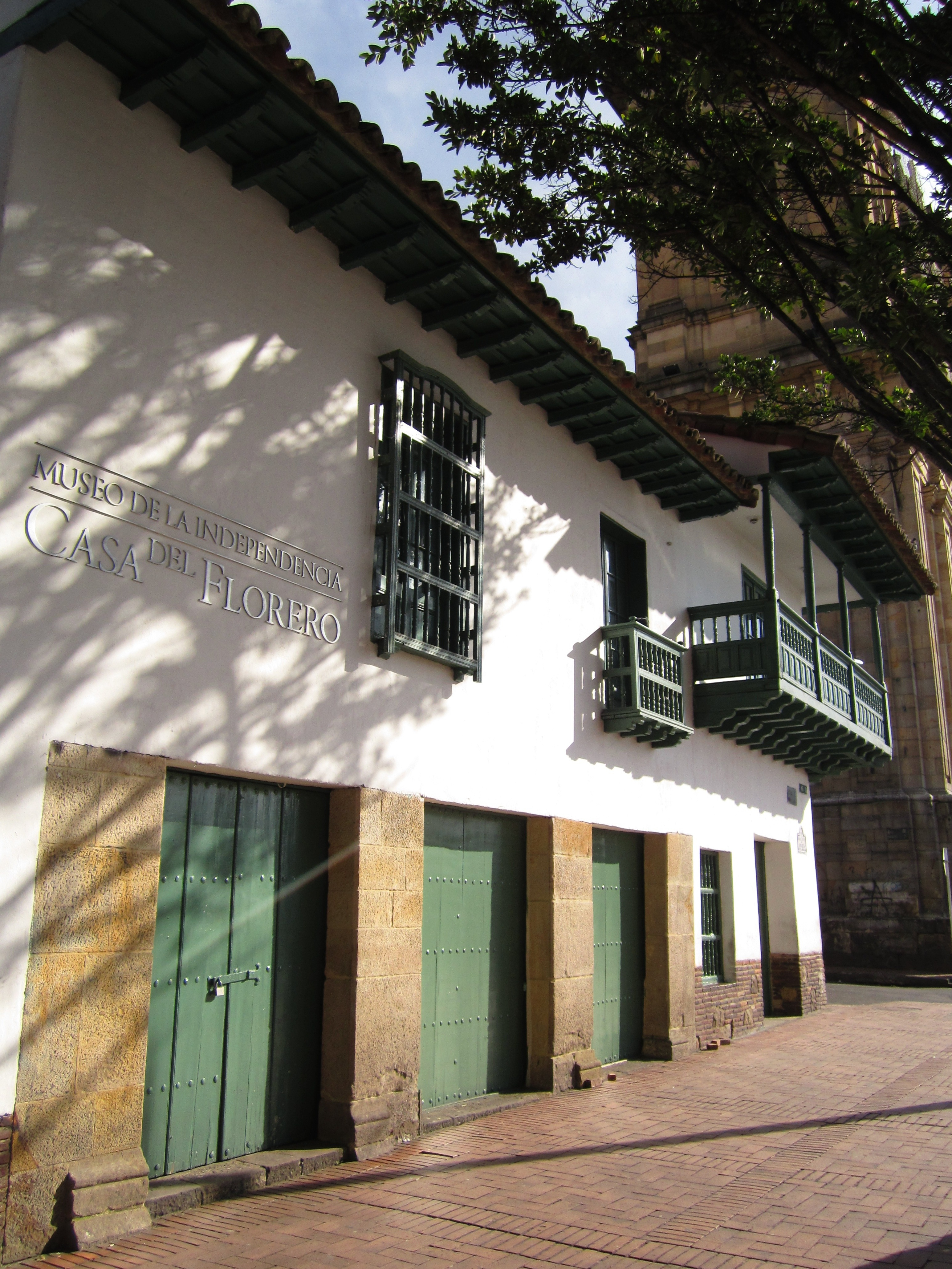 Aveenida carrera 7 con calle 11 Casa Florero, Museo de la Independencia.